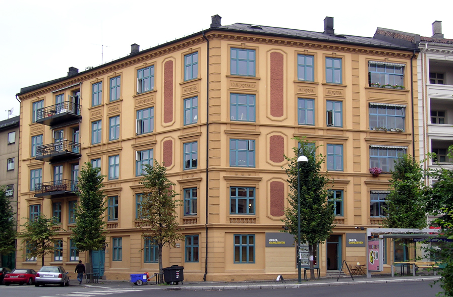 Schweigårds gate 72, Oslo. Apartment blocks erected 1899. Architect: Christen Andersen.